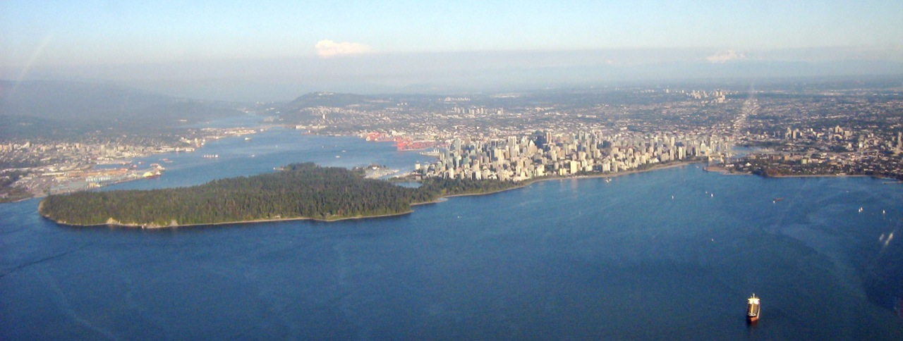 Vancouver from air